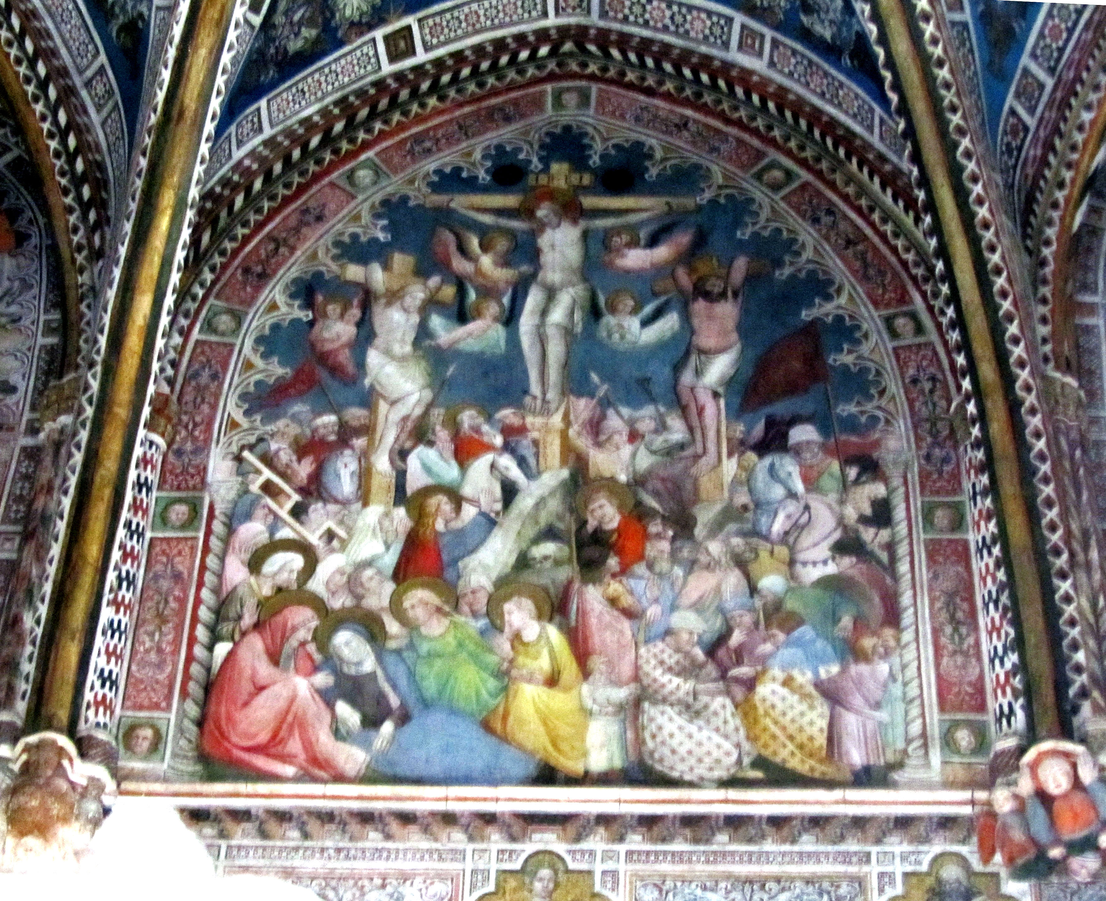 Fresco de la Crucifixión en la capilla de San Blas en la catedral de Yoledo (Spain)